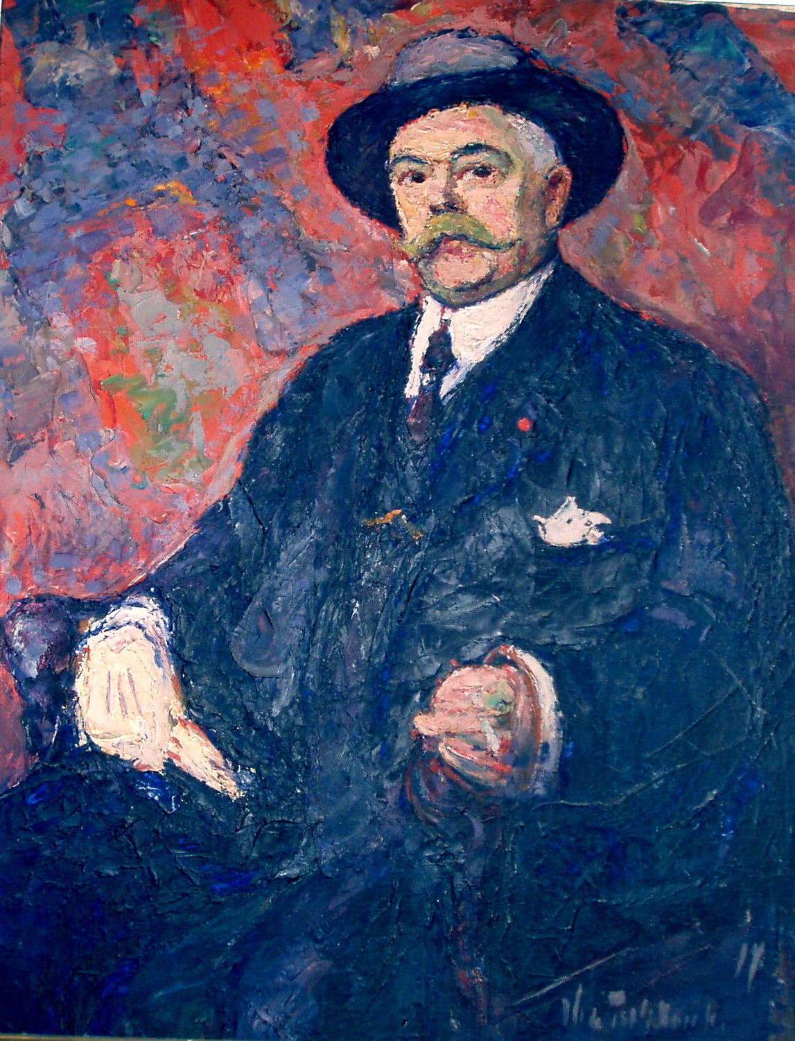 Portrait du banquier Henri Nouvion par Vladimir de Terlikowski (1873–1951)